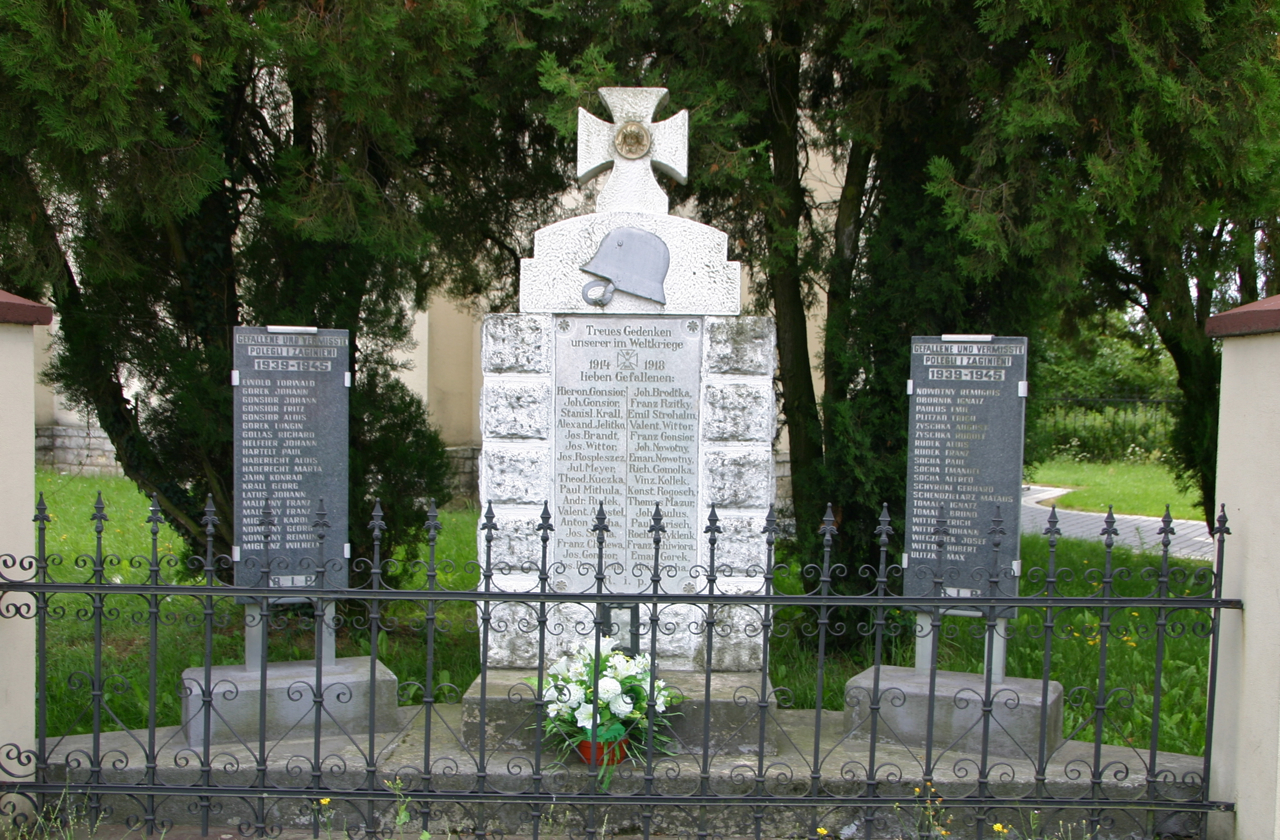 Mokra (dodatkowa nazwa w j. niem. Mokrau) – wieś w Polsce położona w województwie opolskim, w powiecie prudnickim, w gminie Biała.